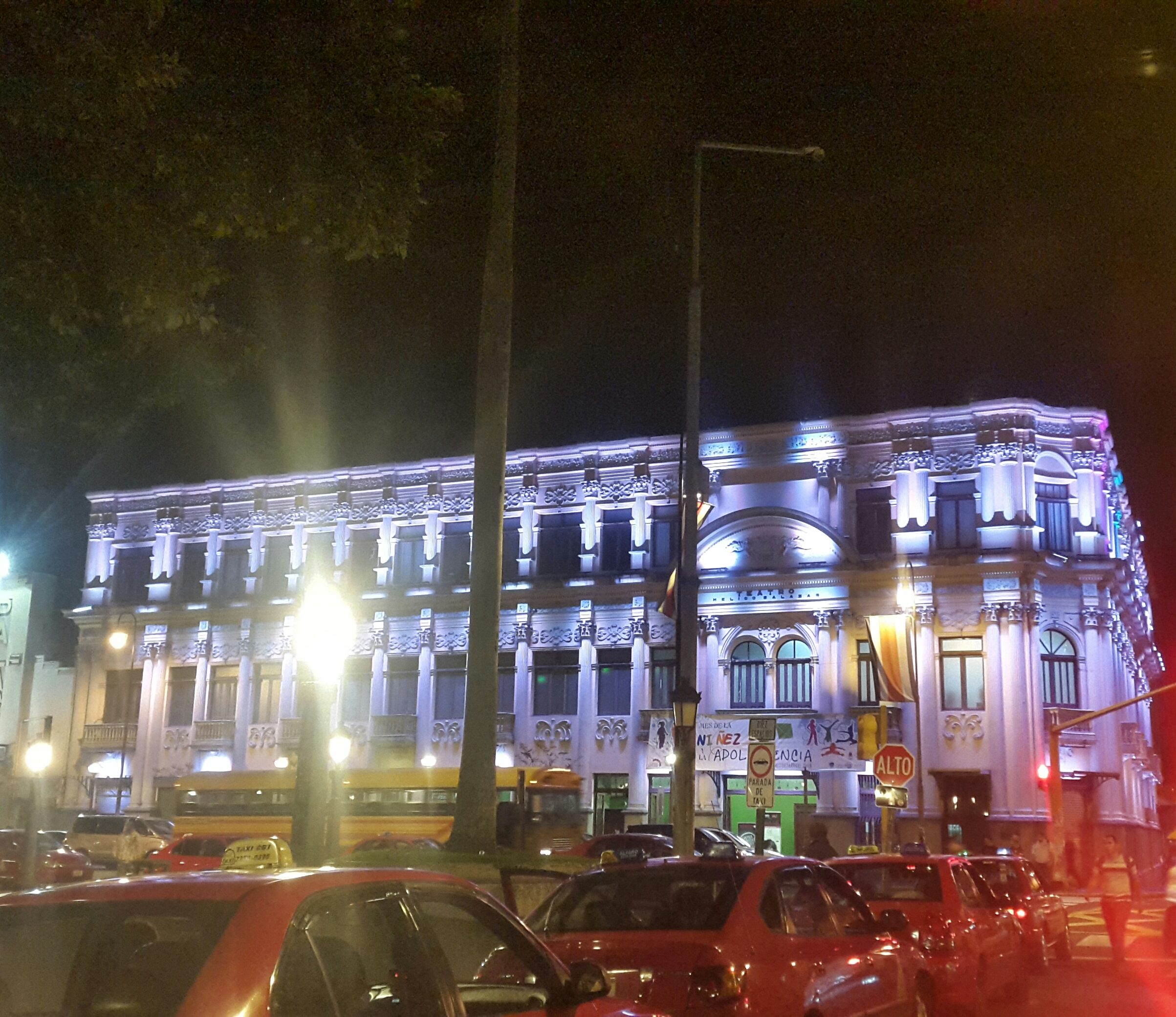 Vista del Teatro Popular Melico Salazar, en San José de Costa Rica, durante la noche.